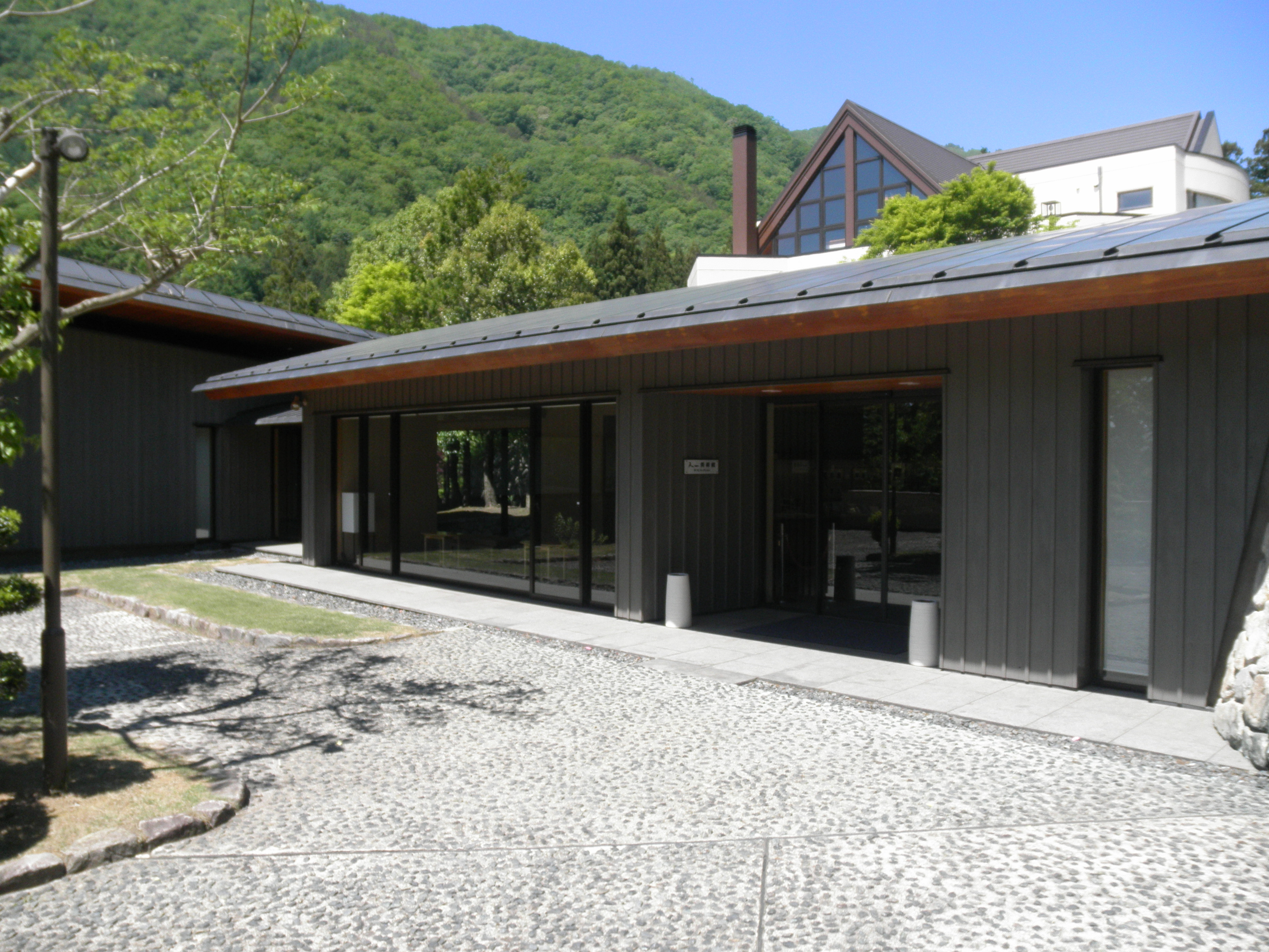 天一美術館